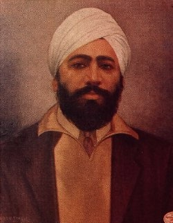 விடுதலைப் போராட்ட போராளி